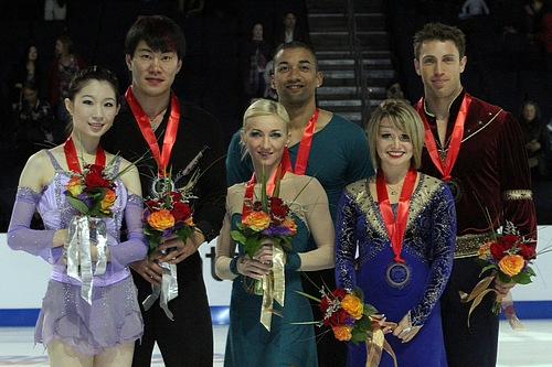 Подиум в парном катании на турнире 2011 Skate America. Слева на право: Чжан Дань / Чжан Хао, Алёна Савченко / Робин Шолковы, Кирстен Мур-Тауэрс / Дилан Москович